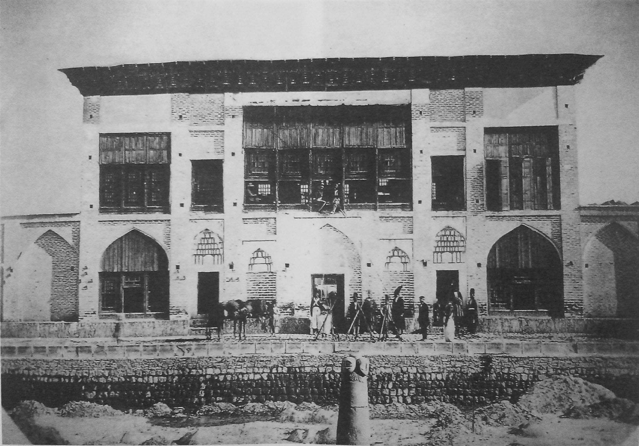 سردر باغشمال تبریز، دوره قاجار